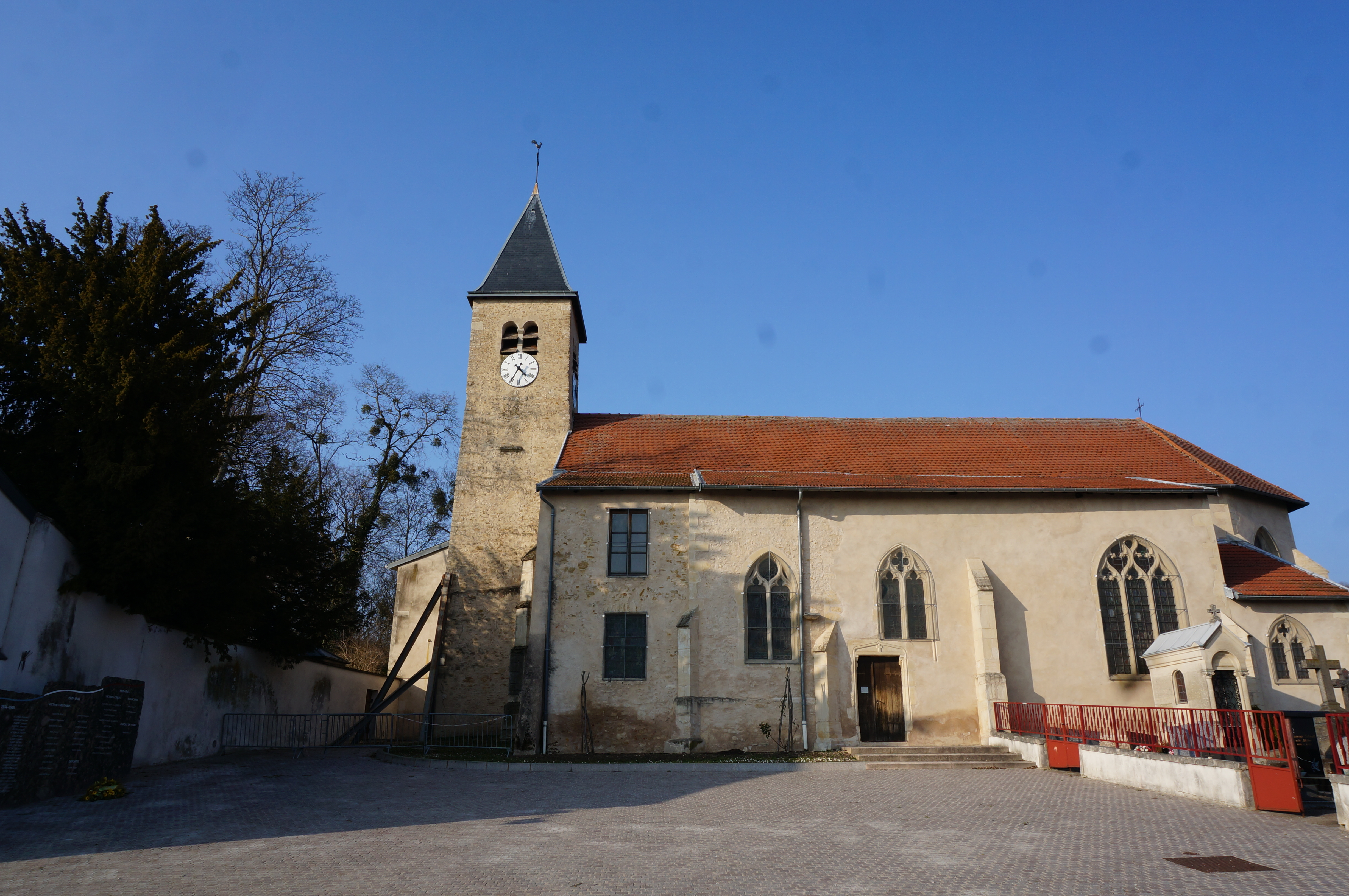 vue de l'église.